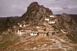 Bön-Kloster Khyungpori Tsedruk in Nord-Tibet (TAR) Foto: A. Gruschke (Freiburg)